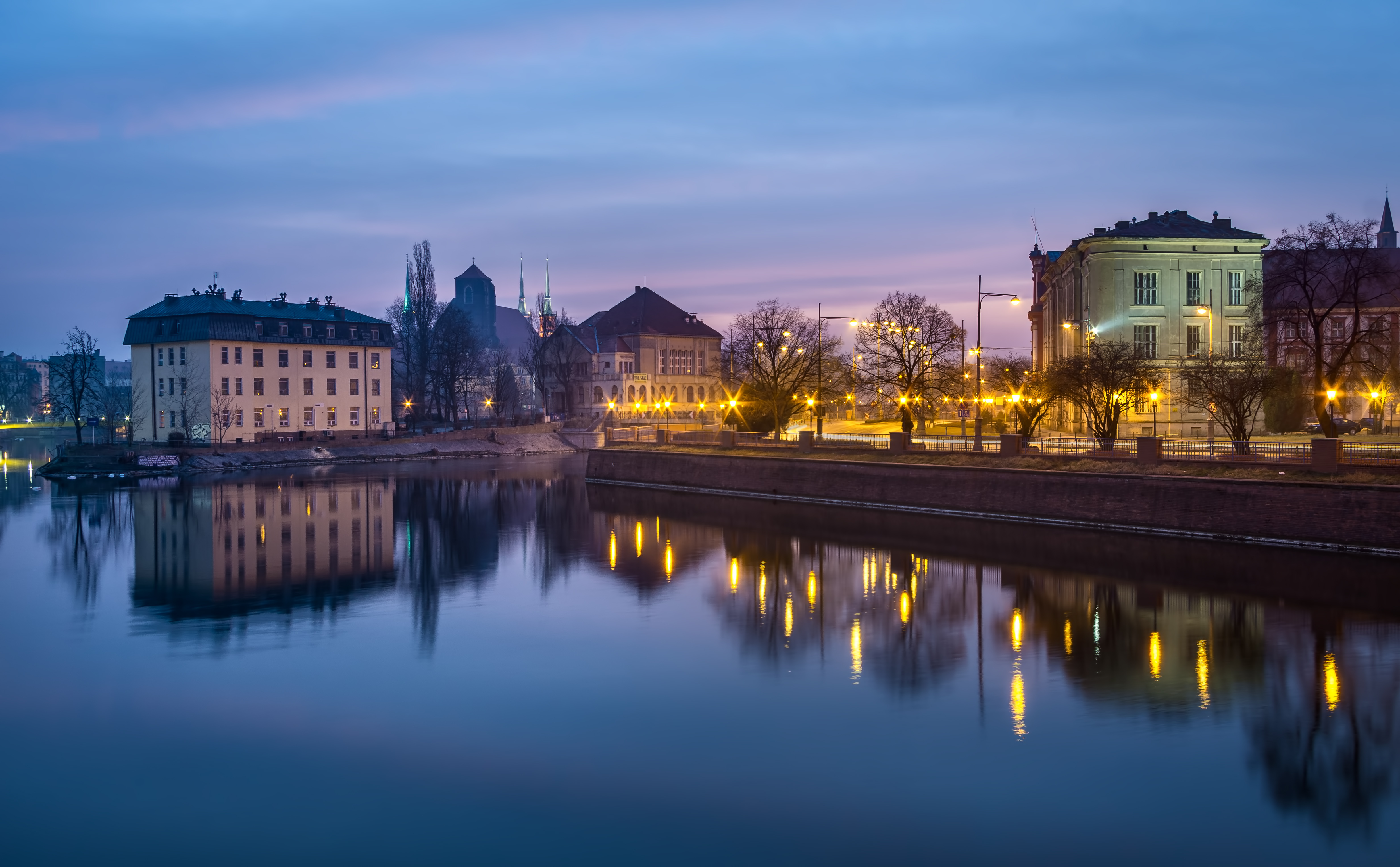 Wrocław, zespół urbanistyczny Ostrowia Tumskiego i wysp: Piaskowej, Bielarskiej, Słodowej